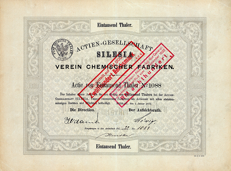 Aktie über 1000 Thaler der AG Silesia Verein Chemischer Fabriken vom 1. Januar 1872